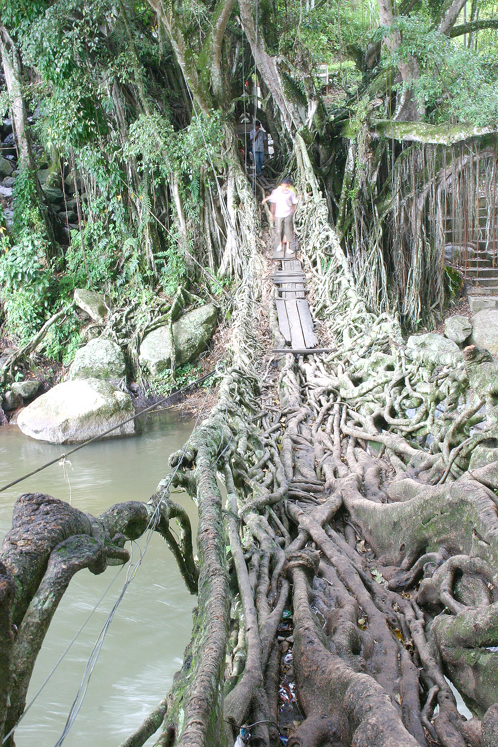 Jembatan Akar: A bridge made from root in Minang, Sumatra, Indonesia